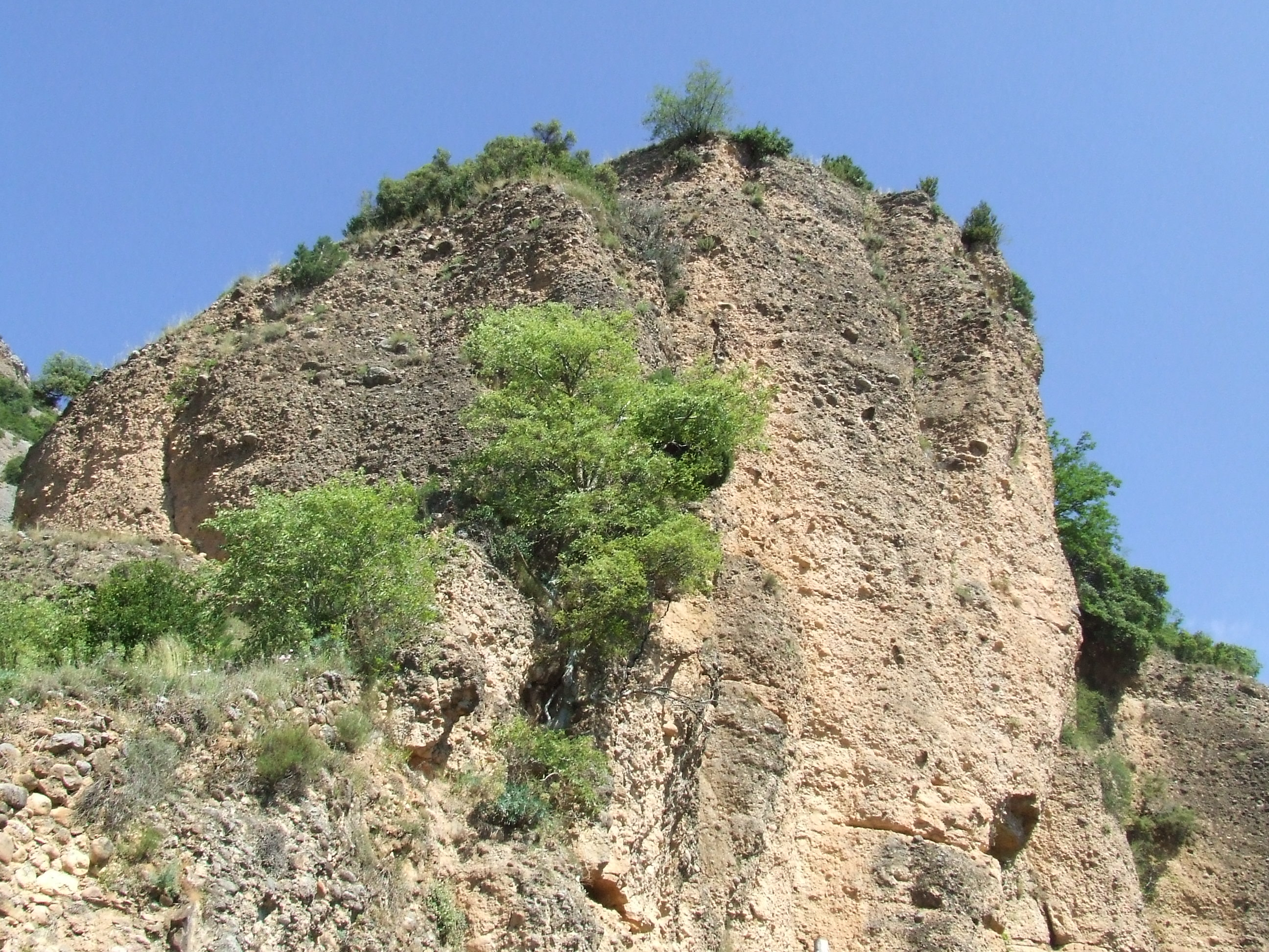 Roc damunt del qual hi havia el castell de Serradell (Toralla i Serradell, Conca de Dalt, Pallars Jussà)